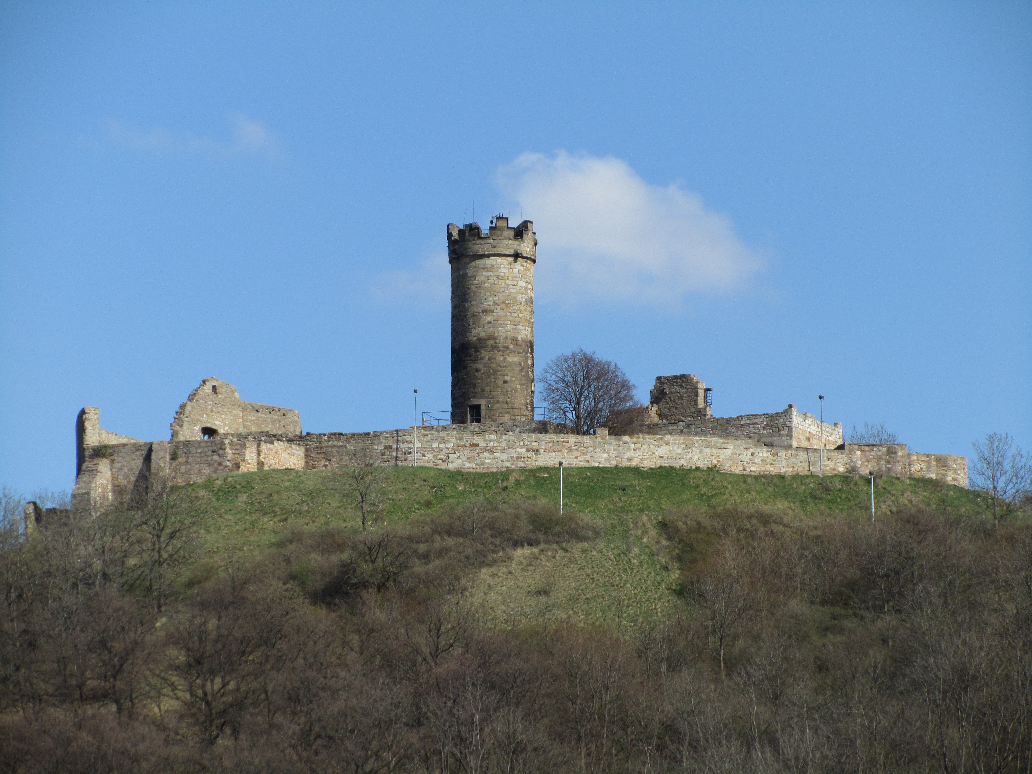 Die Mühlburg bei Mühlberg (Thüringen).